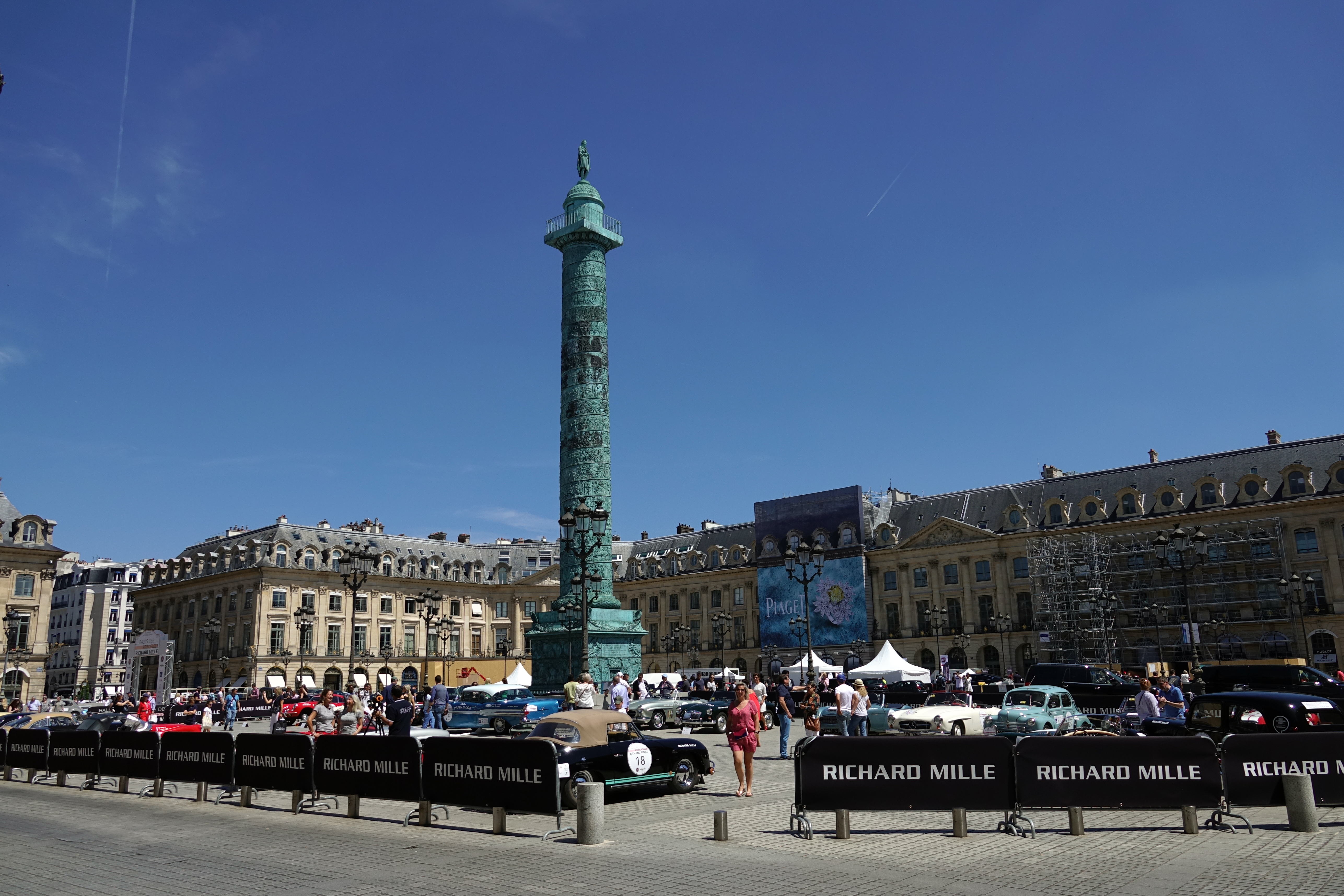 Rallye des Princesses 2019-Place Vendôme-Paris